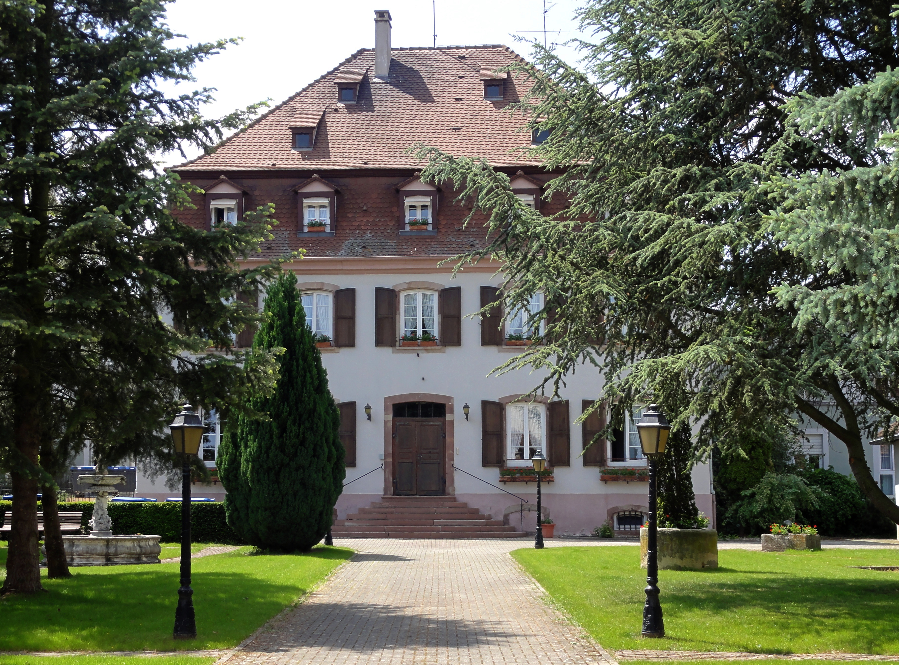 Alsace, Bas-Rhin, Geispolsheim, Ancien presbytère (1759), Actuellement maison de retraite, rue du Presbytère. .